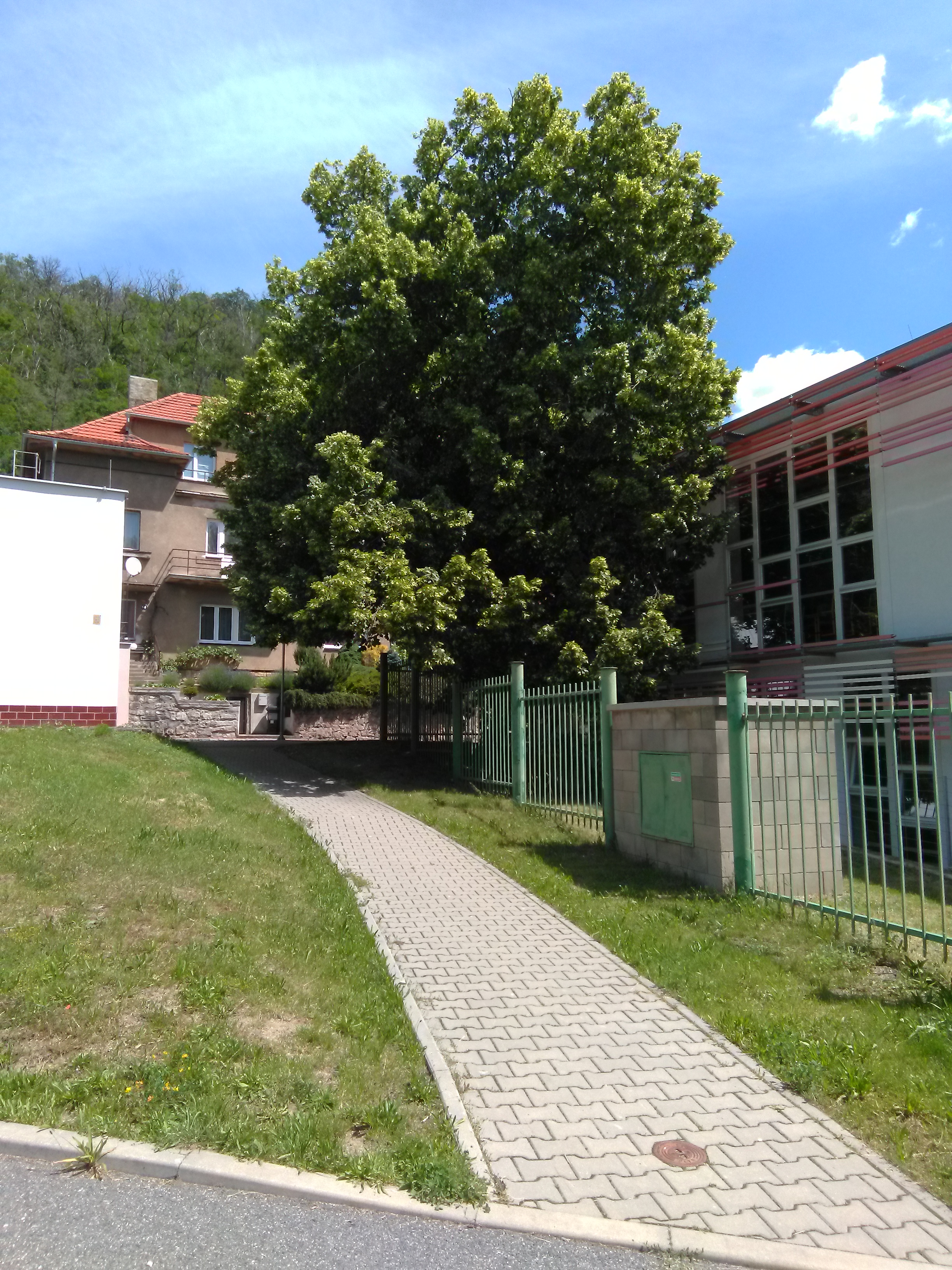 Lípa velkolistá (Tilia platyphyllos). Praha 5 - Velká Chuchle, u Základní školy. Vysazena 15. července 1928 k 10. výročí vzniku Československé republiky. Významný strom, evidenční číslo MHMP: 73, v databázi od roku 2018.